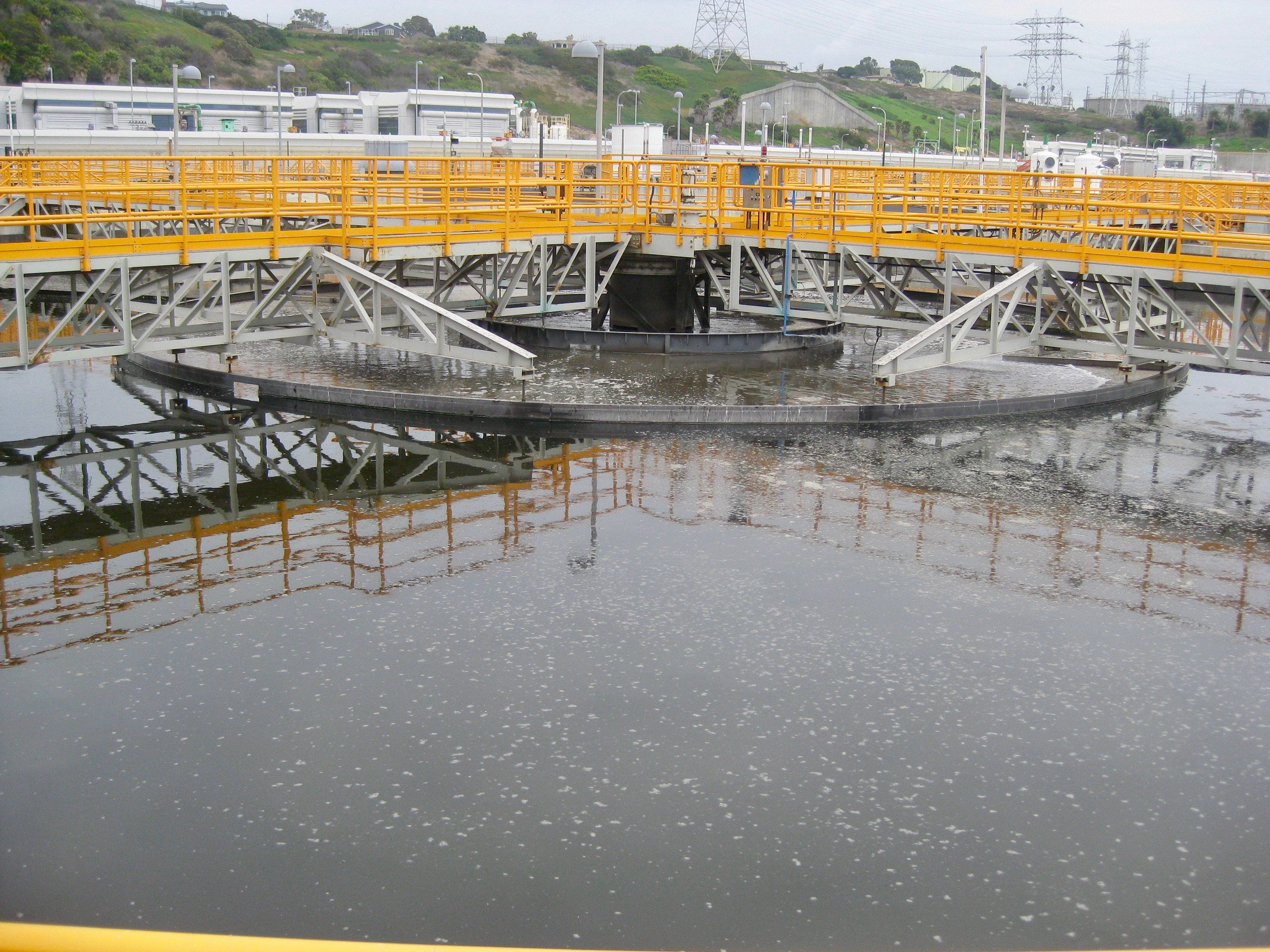 Wasseraufbereitungsanlage genannt Hyperion in LosAngeles